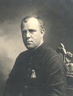 Йосиф Яков Стойков